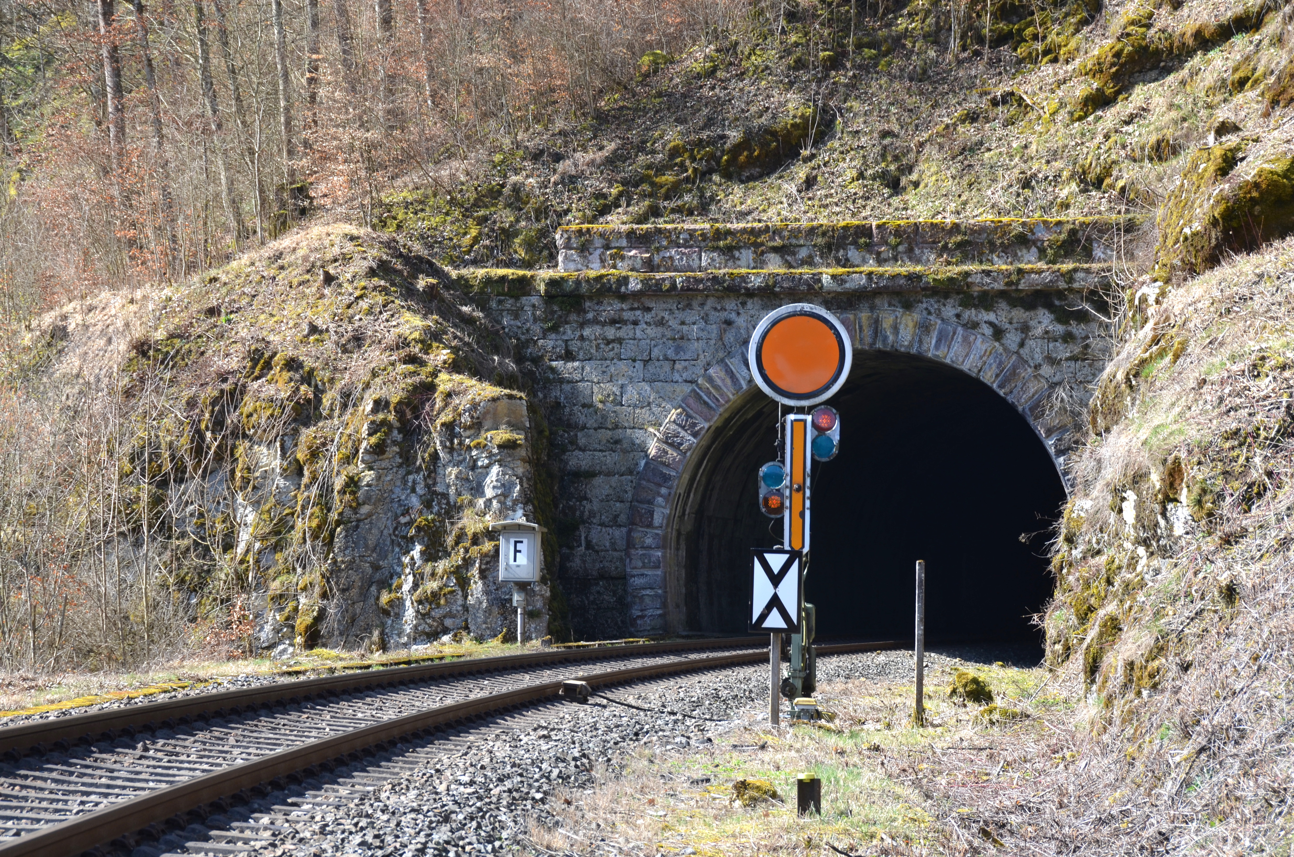 Vorsignal zum Einfahrsignal Fridingen (2018)